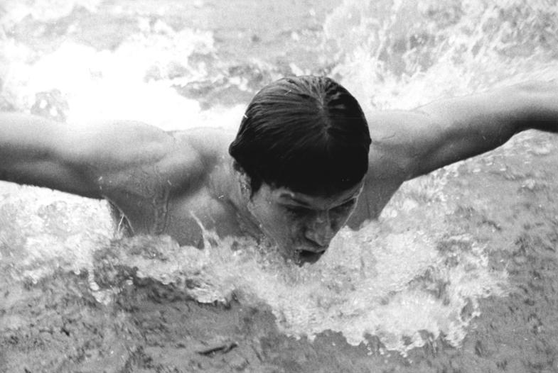 Hartmut Flöckner ADN-ZB Mittelstädt 12-7-73 Berlin: 24. DDR-Meisterschaften im Sportschwimmen im Freiwasserbecken des Dynamo-Sportforums-DDR-Rekordhalter Hartmut Flöckner (TSC Berlin) erkämpfte sich überlagen den Meistertitel über 200 m Schmetterling (2:06,02 min).